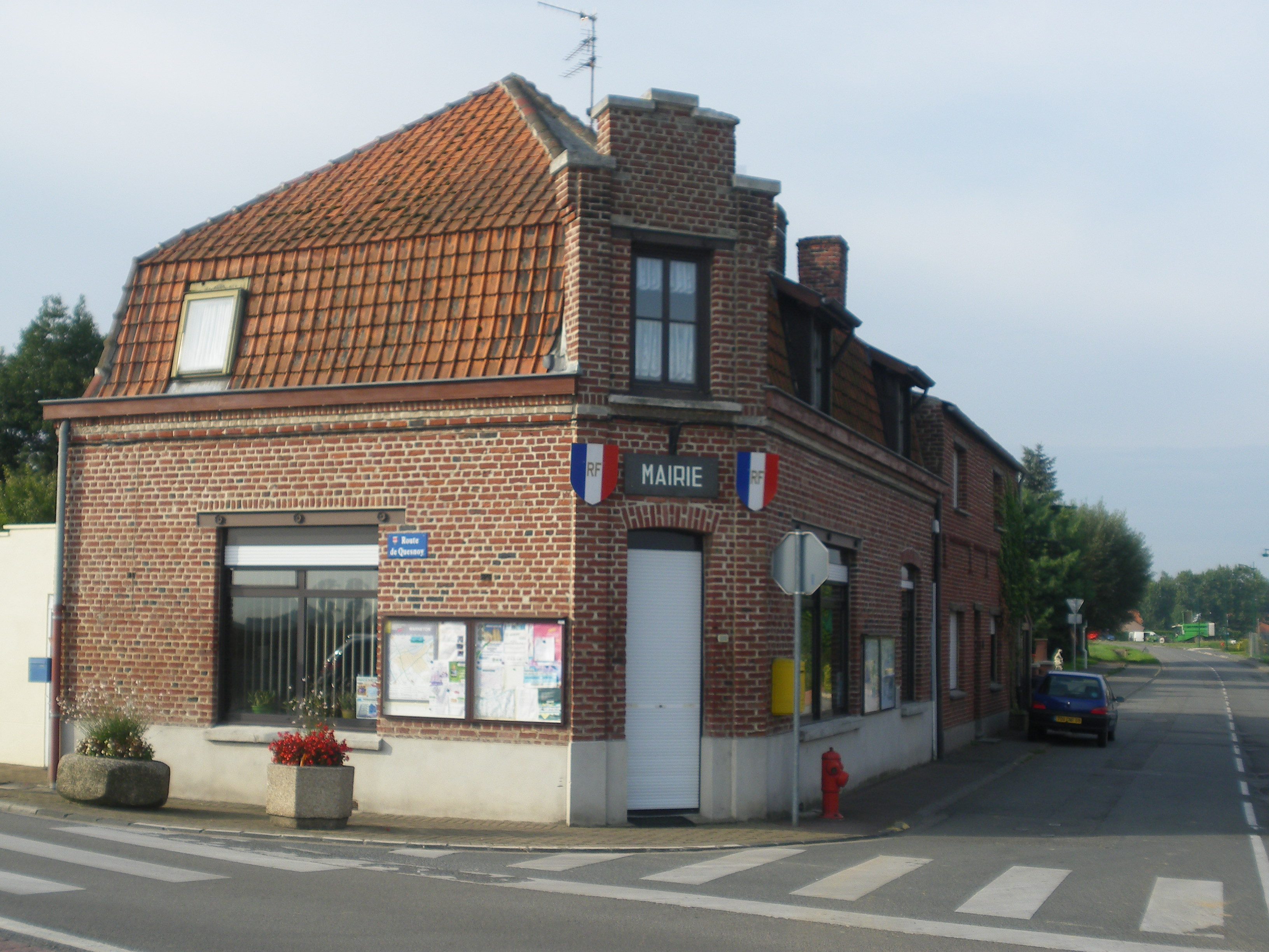 Vue de la mairie de la commune française de Warneton.